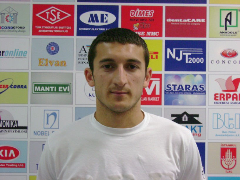 Вугар НадировФорвард Хазар-Ленкорань